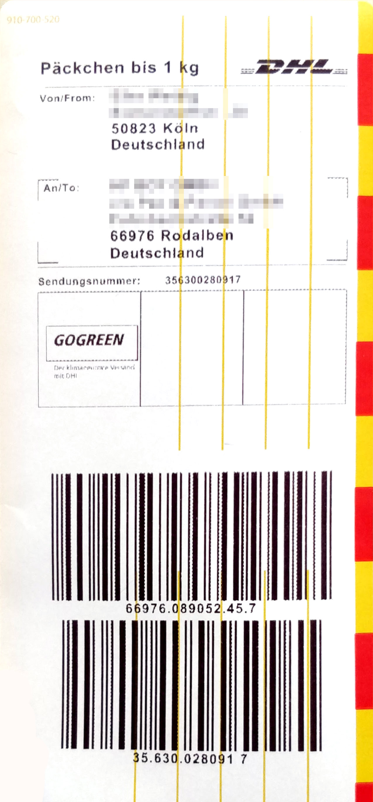 Paketaufkleber DHL Päckchen bis 1 kg innerdeutsch, gedruckt durch Packstation 2018